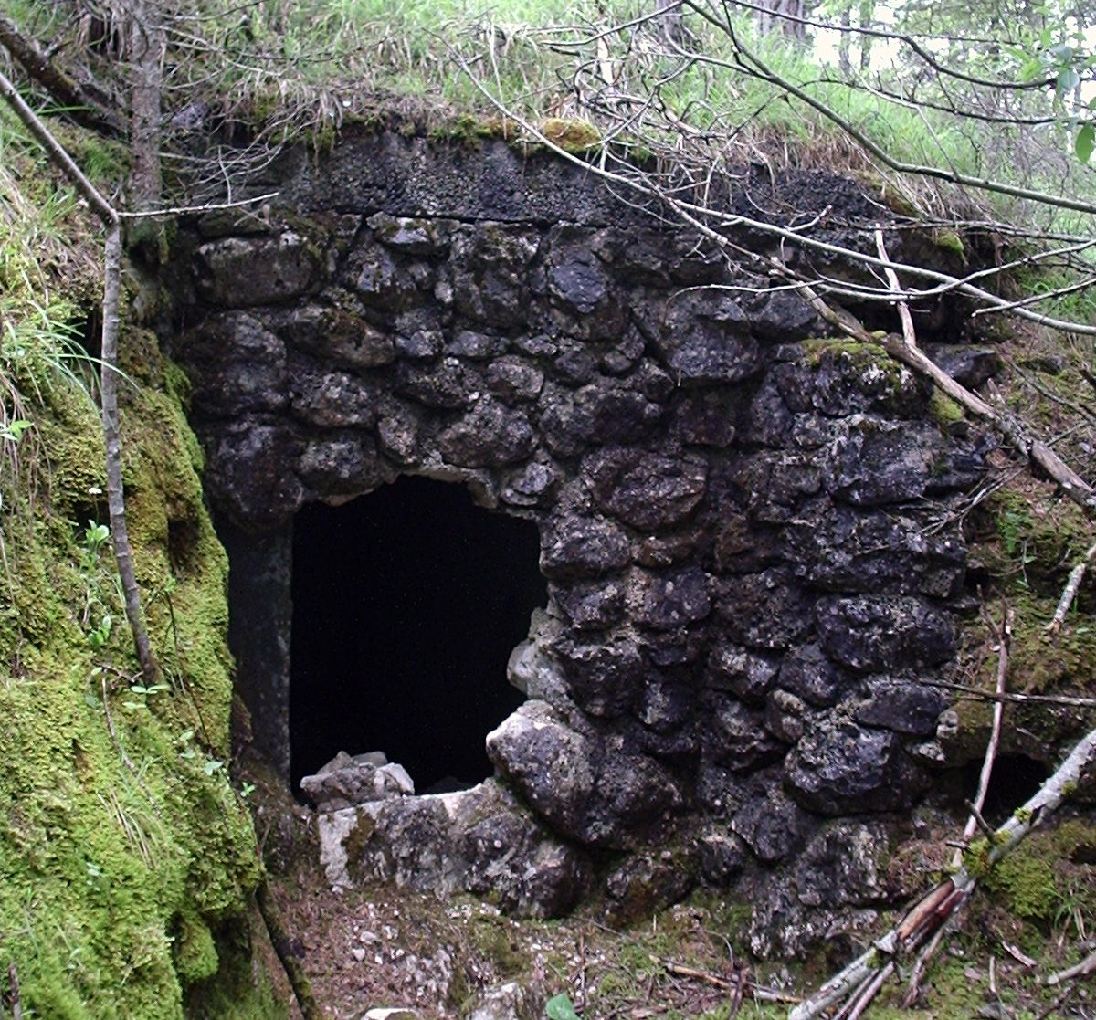 L'ingresso dell'opera 1, nello sbarramento di Landro Sorgenti